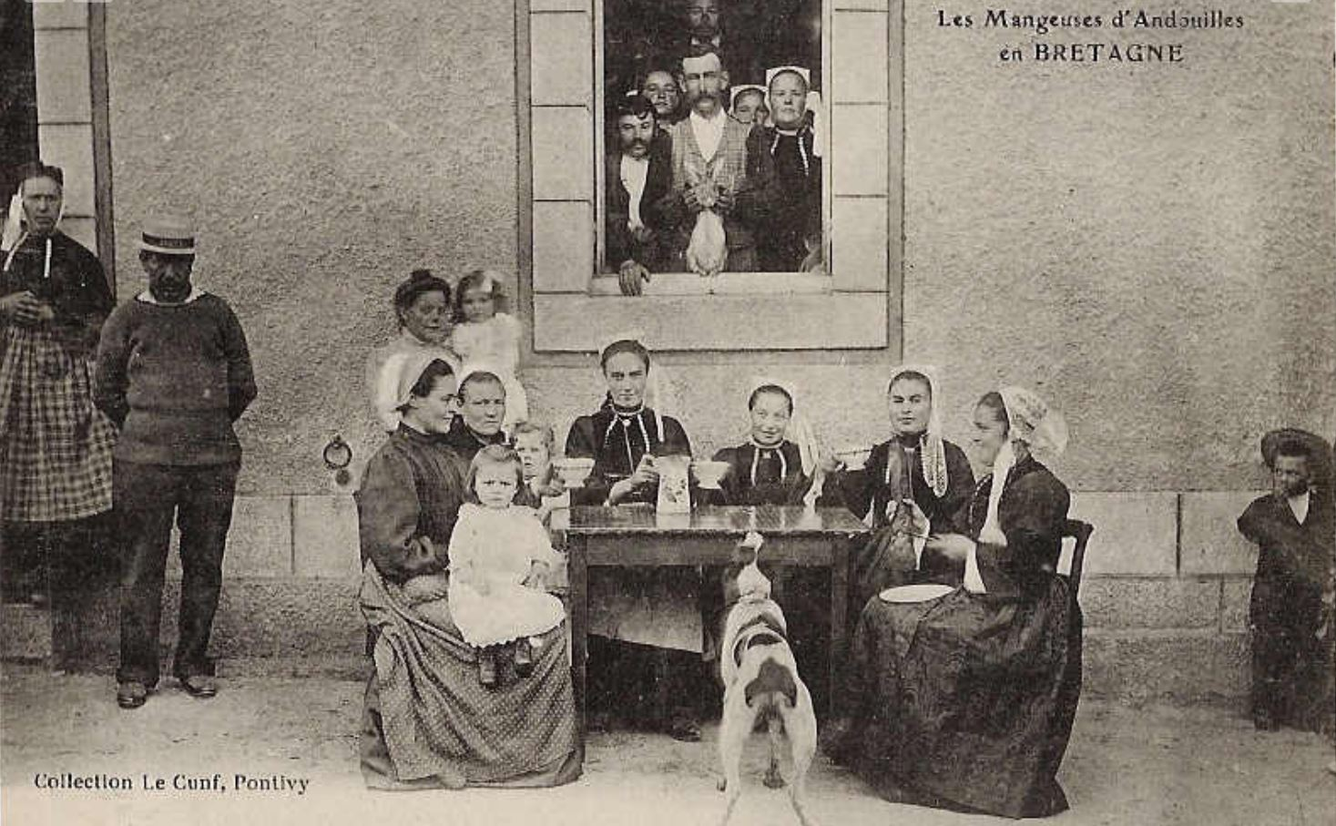 carte postale ancienne du premier quart du vingtième siècle édité par Le Cunf de Pontivy